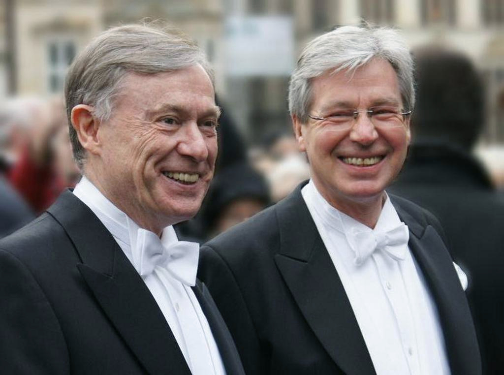 „Stimmungsbild“ von der 465. Schaffermahlzeit 2009 von Haus Seefahrt im historischen Rathaus in Bremen, Deutschland: Der Bundespräsident Horst Köhler (links) und der Bremer Bürgermeister Jens Böhrnsen auf dem Bremer Marktplatz, auf dem Wege zur Veranstaltung, zu der sie als Ehrengast bzw. Gast eingeladen sind.